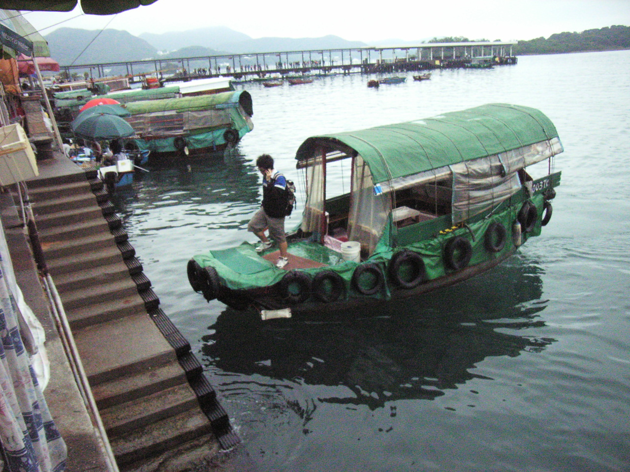 西貢市 西貢碼頭] (Sai Kung) 本身是一個漁村，漁民經常在此聚集，因而逐漸發展成一個著名的zh:海鮮勝地。今日西貢碼頭沿街都是這些擺賣海鮮的攤檔，並且有一些海鮮菜館。 (Photo by me.)